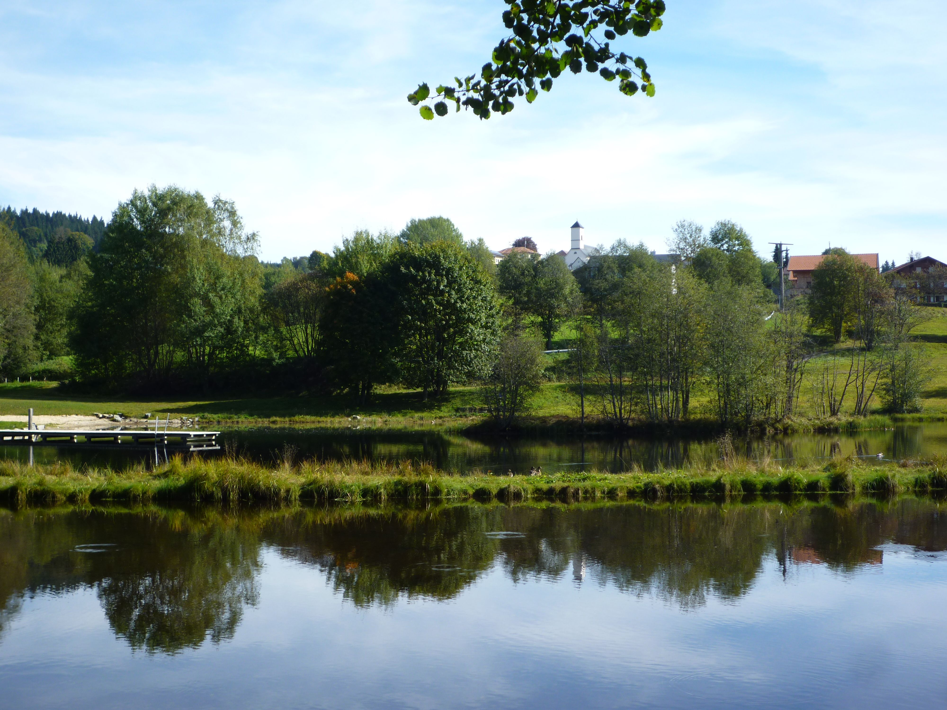 Mauth - Badesee